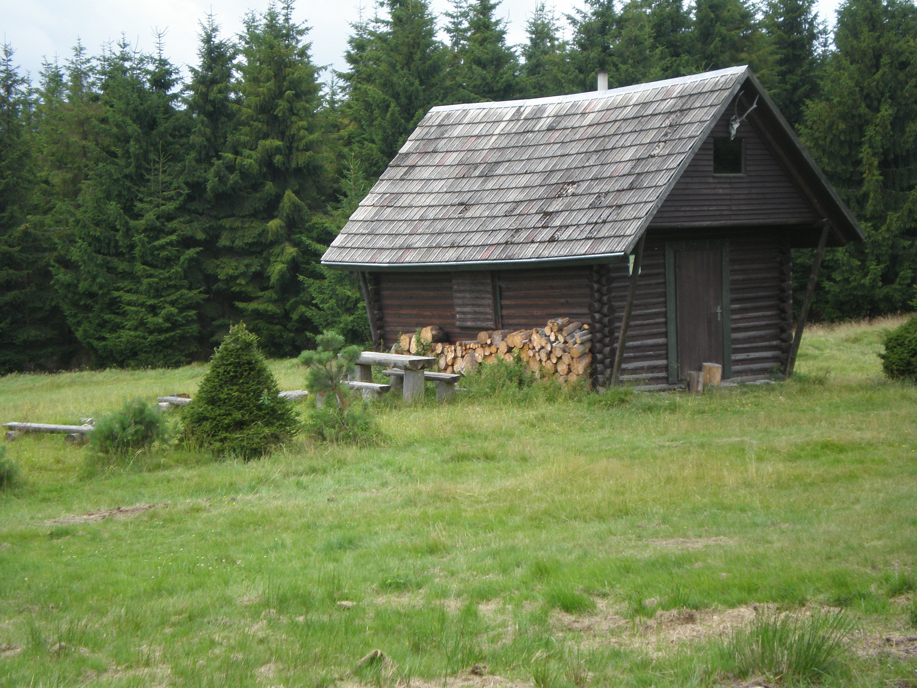 Lovecká chata nedaleko bývalé hájovna Carvánka na Toku